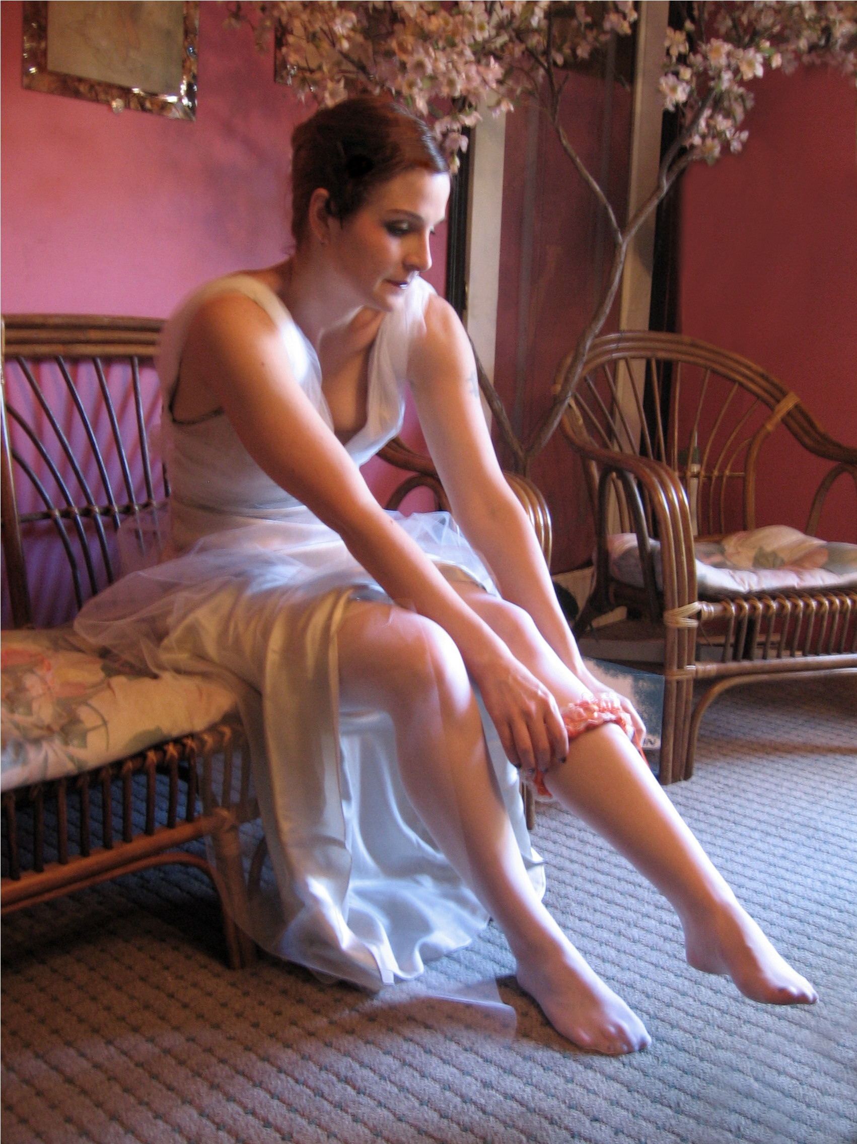 Bride getting dressed.